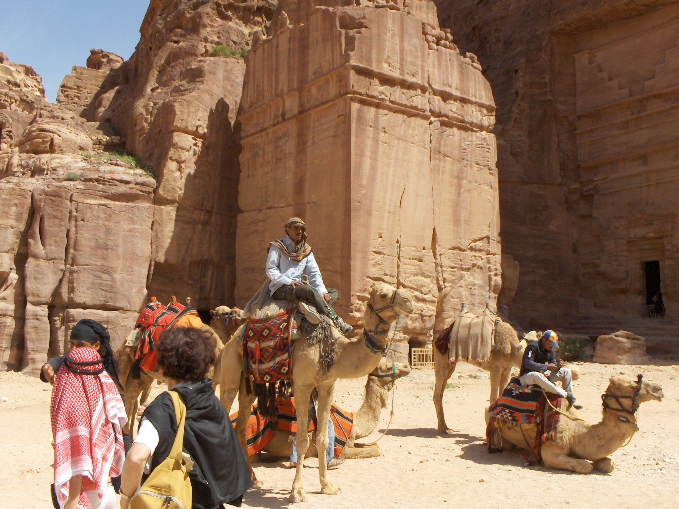 Dromedari nella via delle facciate a Petra